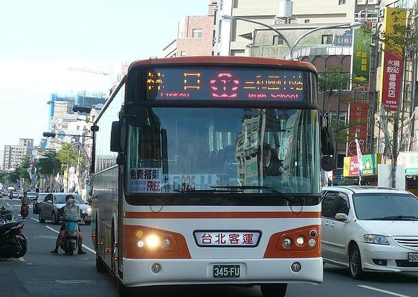 臺北客運大客車345-FU行駛新北市區公車925線。